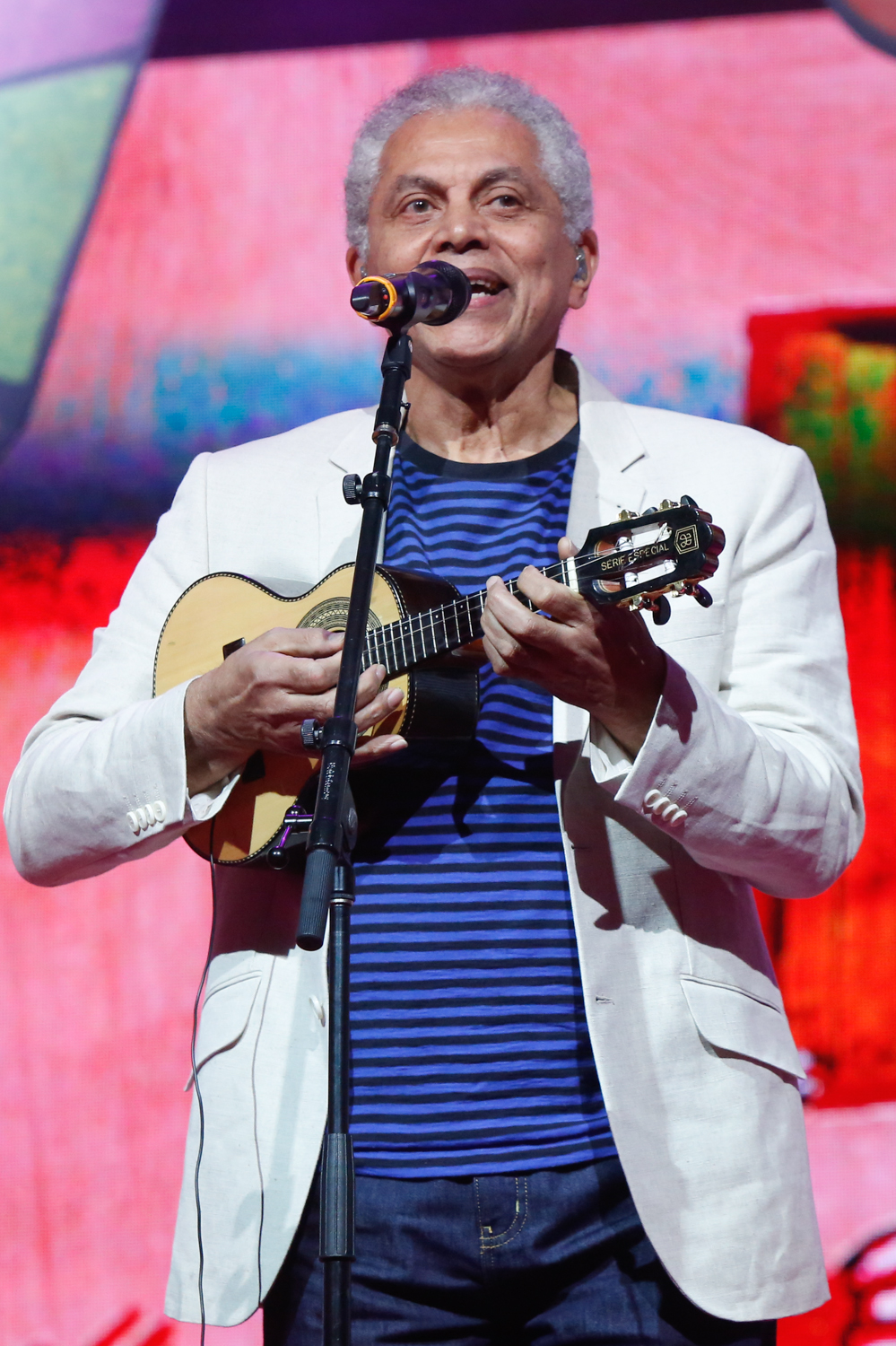 Paulinho da Viola durante o 25º Premio da Musica Brasileira no Theatro Municipal. Foto: Roberto Filho (14/05/14)